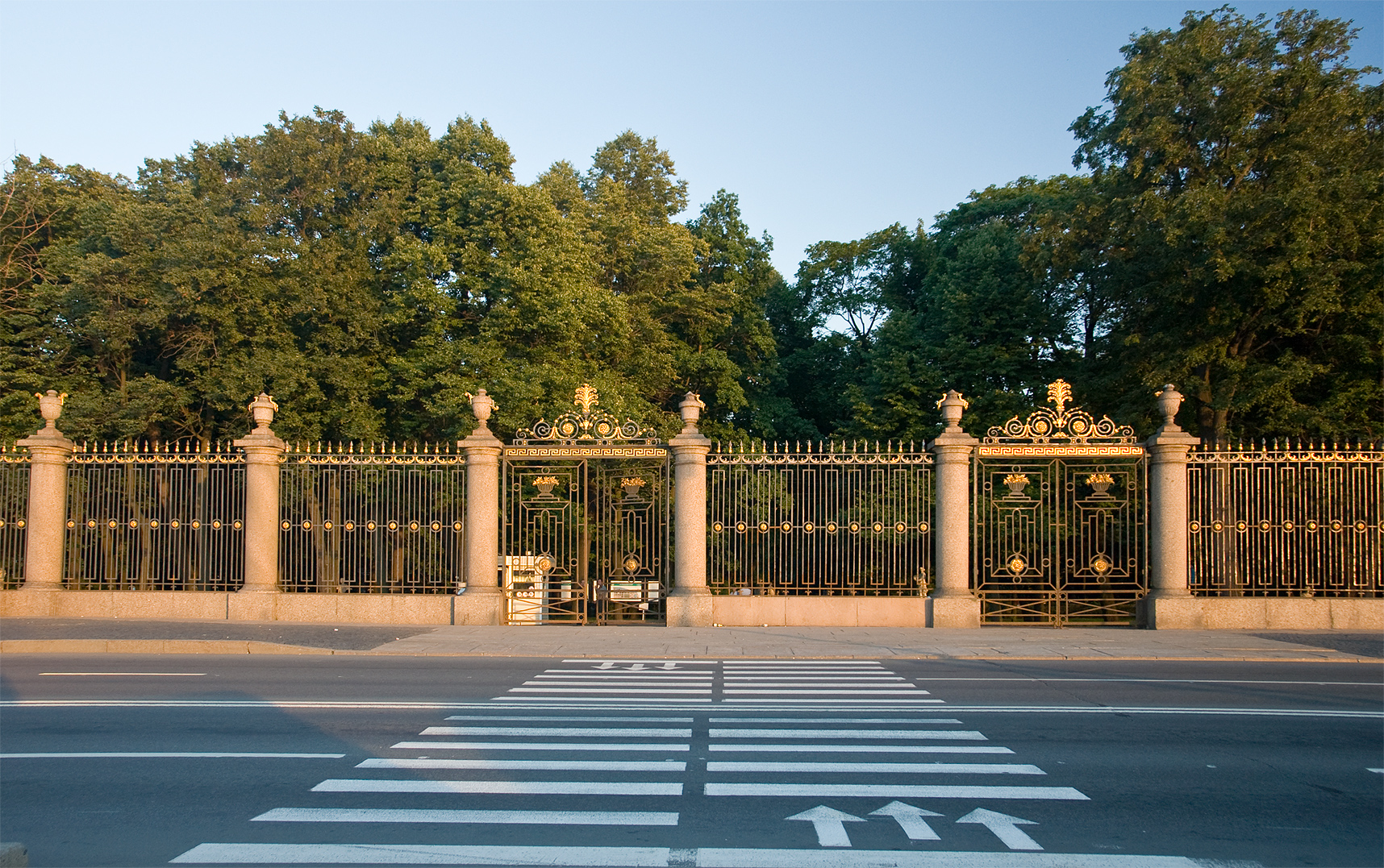 Вход в Летний сад (вечер)